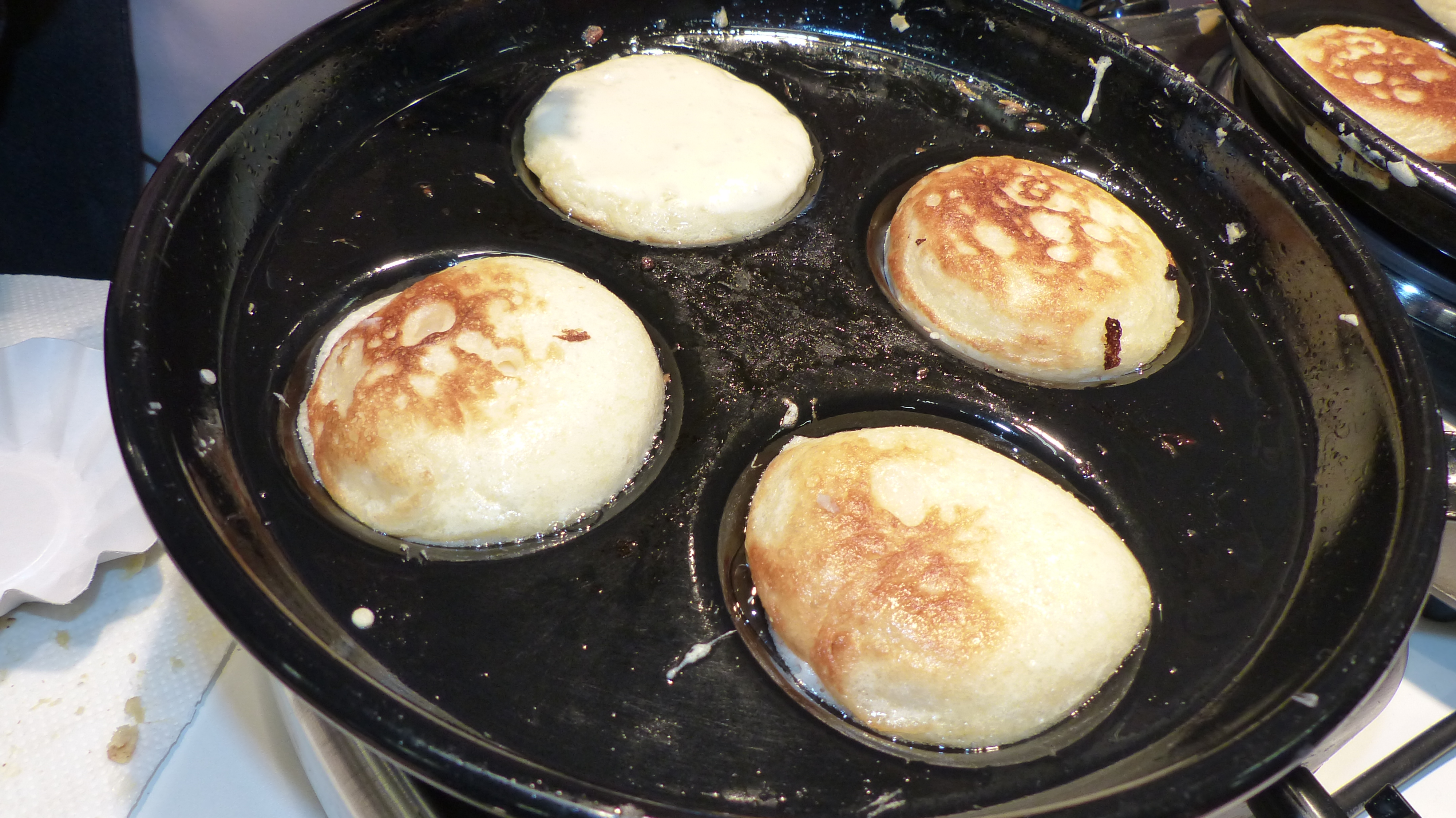 Böhmische Liwanzen (livancy) (gegossene Dalken)